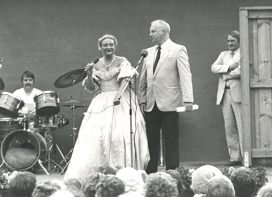 Granbackekväll 1984, Marianne Mörck, foto J Hansson. Från fotoarkiv i Burlövs kommun.